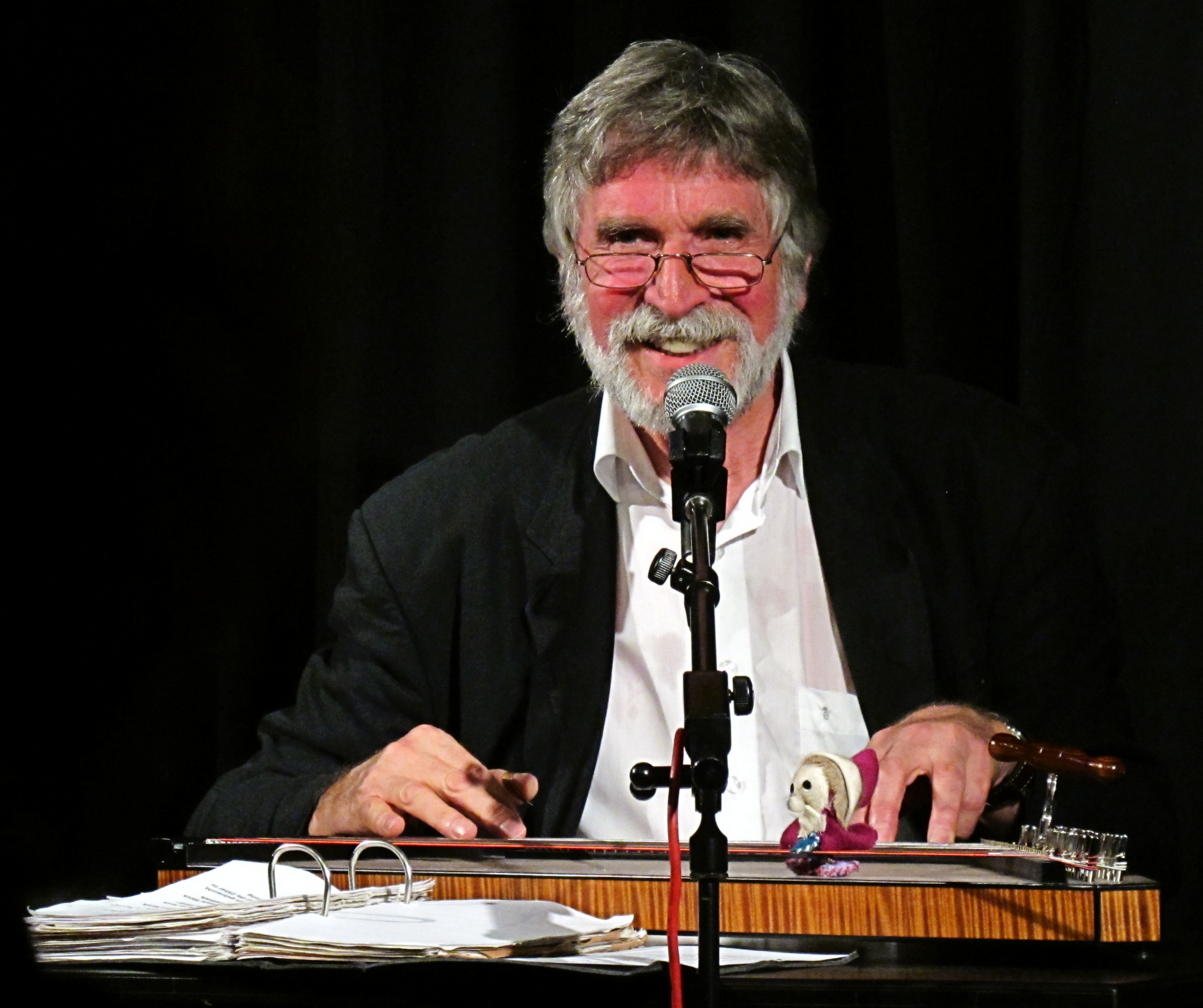 Manfred Zick, bekannt als Zither-Manä, am 18. November 2010 in Raabes Wirtshausbrettl in Steinebach am Wörthsee